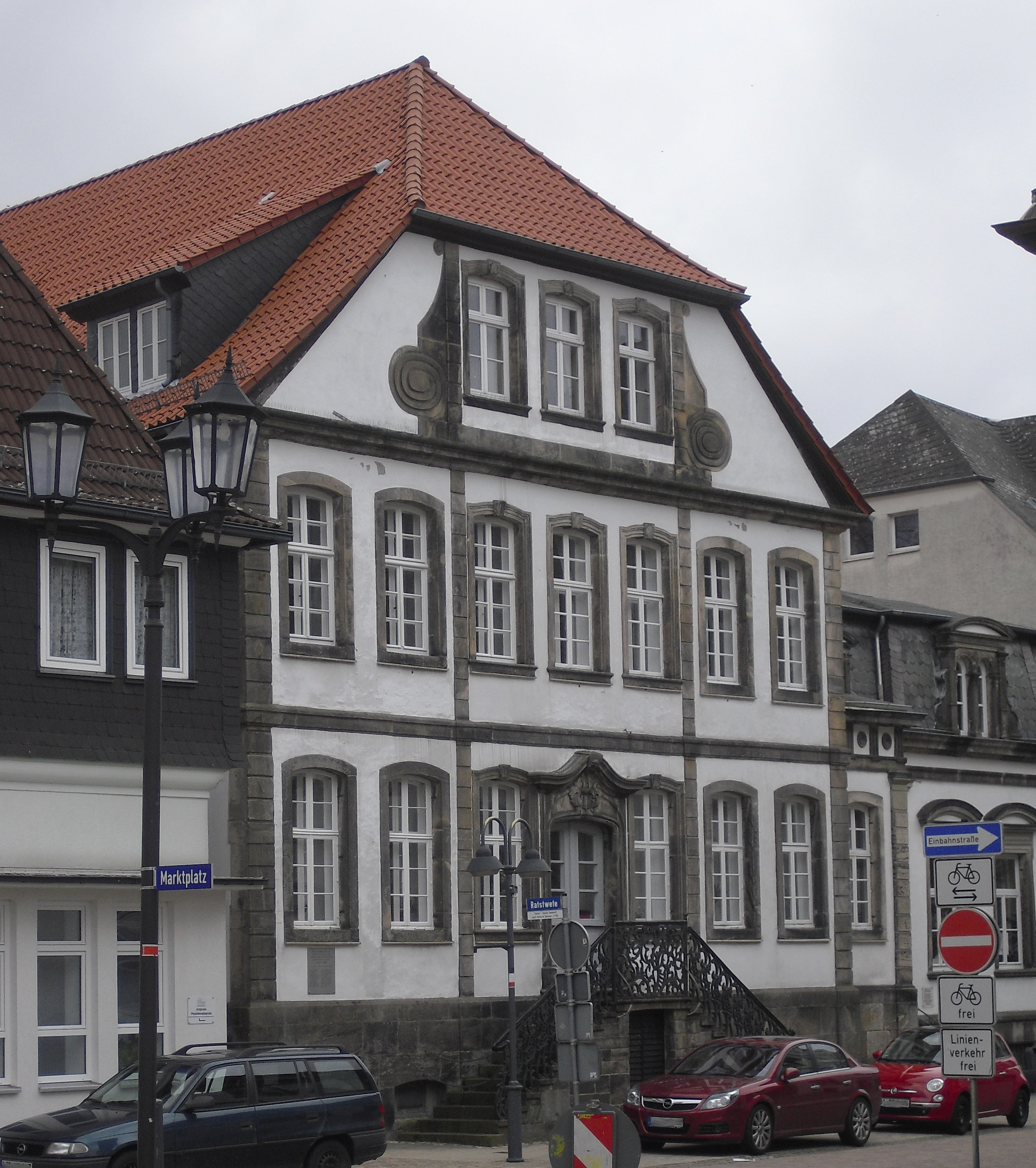 Stadthaus (ehem. Amtsgericht) in Horn This is the photograph of an architectural monument. It is part of the list of cultural monuments of Bad Lippspringe, no. 01.30